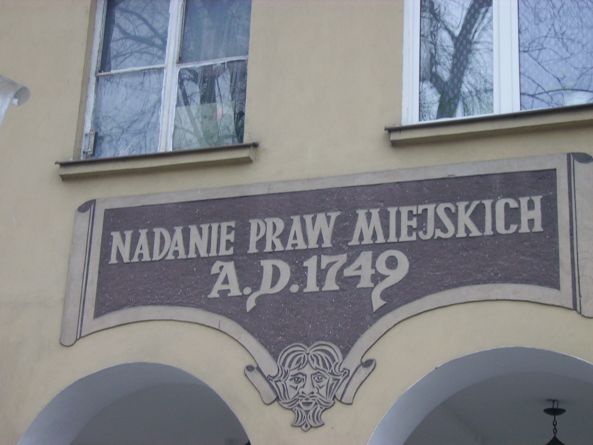 Białystok. Rynek Kościuszki 5A. Mural upamiętniający nadanie praw miejskich (widok od ul. Sienkiewicza)